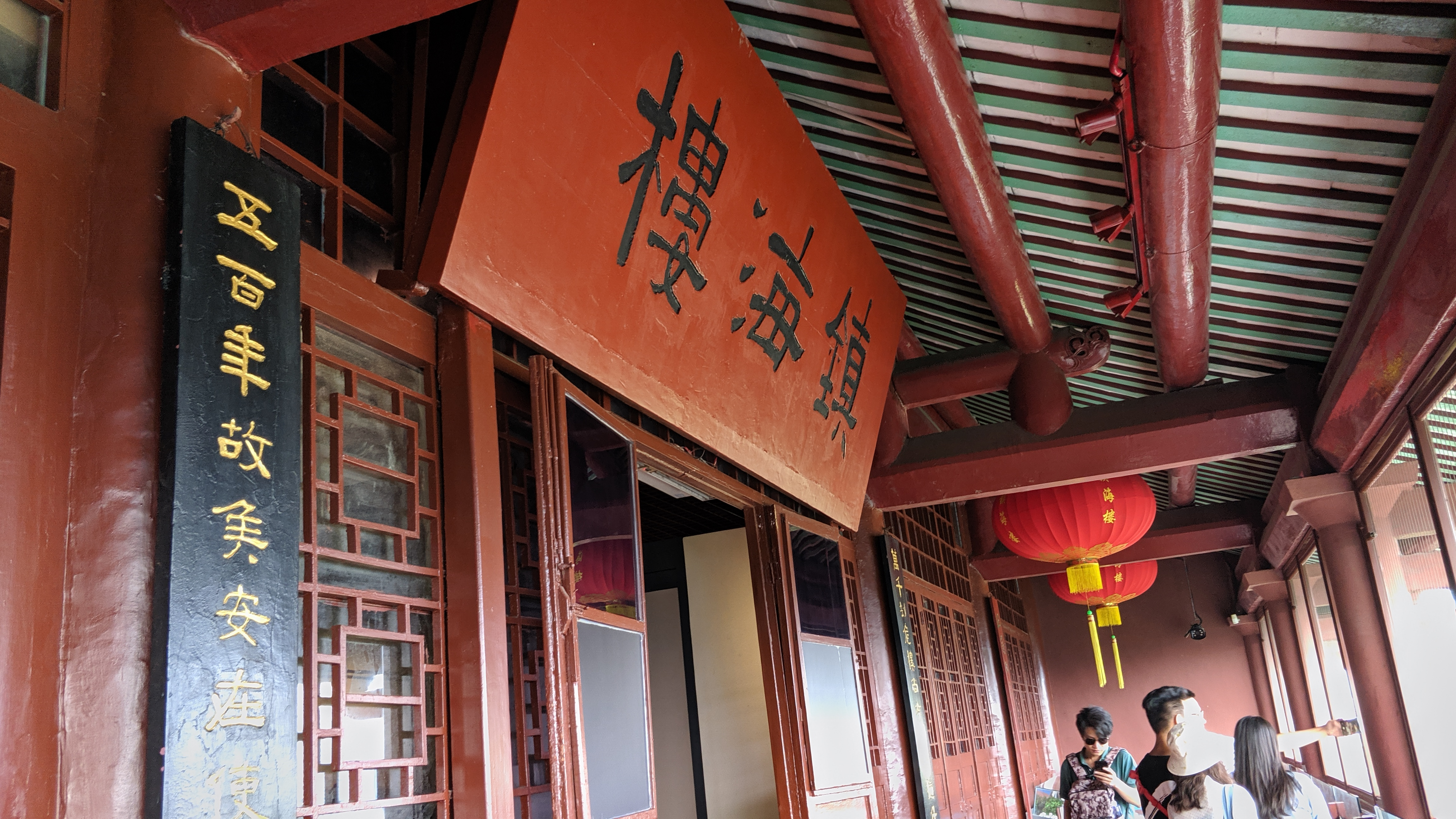 广州越秀镇海楼顶楼牌匾